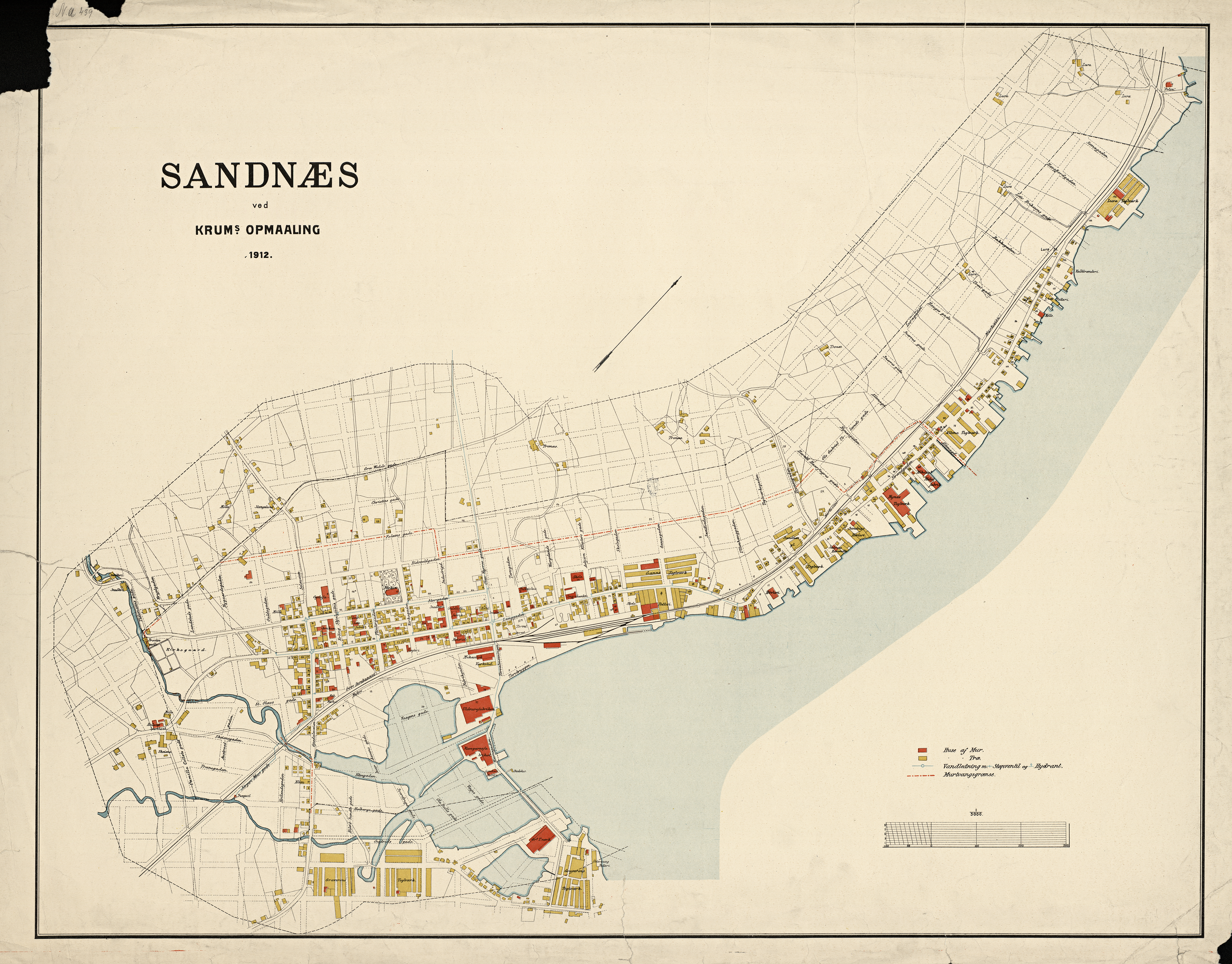 NS Krums kart over Sandnes fra 1912.